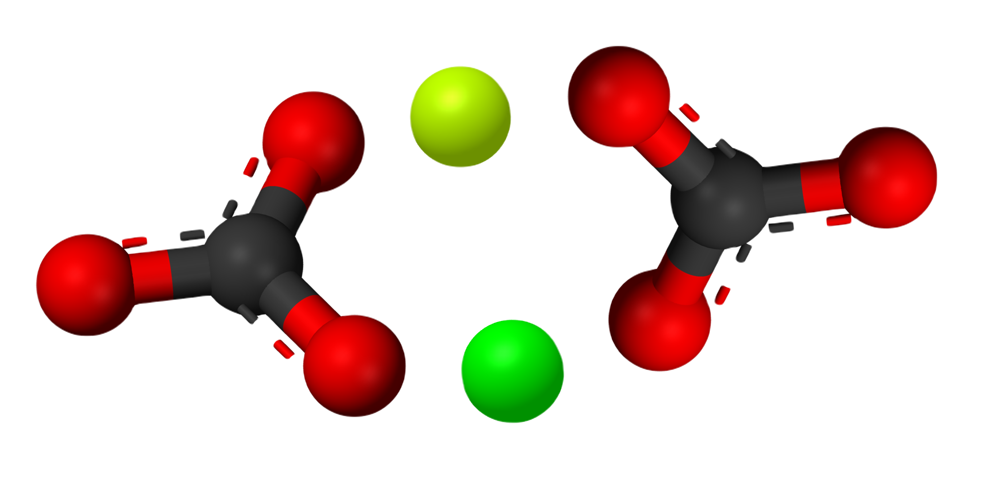 Dolomite 3D Molecule, CaMg(CO3)2